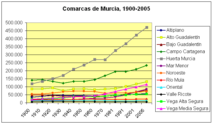 The population of the regions of Murcia (modern distribution), Spain, (1900-2005). Totals of each region: Altiplano, Alto Guadalentín, Bajo Guadalentín, Campo de Cartagena, Huerta de Murcia, Mar Menor, Noroeste, Río Mula, Oriental, Valle de Ricote, Vega Alta del Segura, and Vega Media del Segura. Own work, given to PD. Source: Instituto Nacional de Estadística.